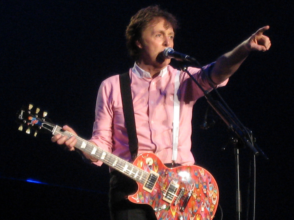 Paul McCartney in Arnhem, playing his customised Les Paul Guitar painted by Rosie Brooks at the GelreDome.